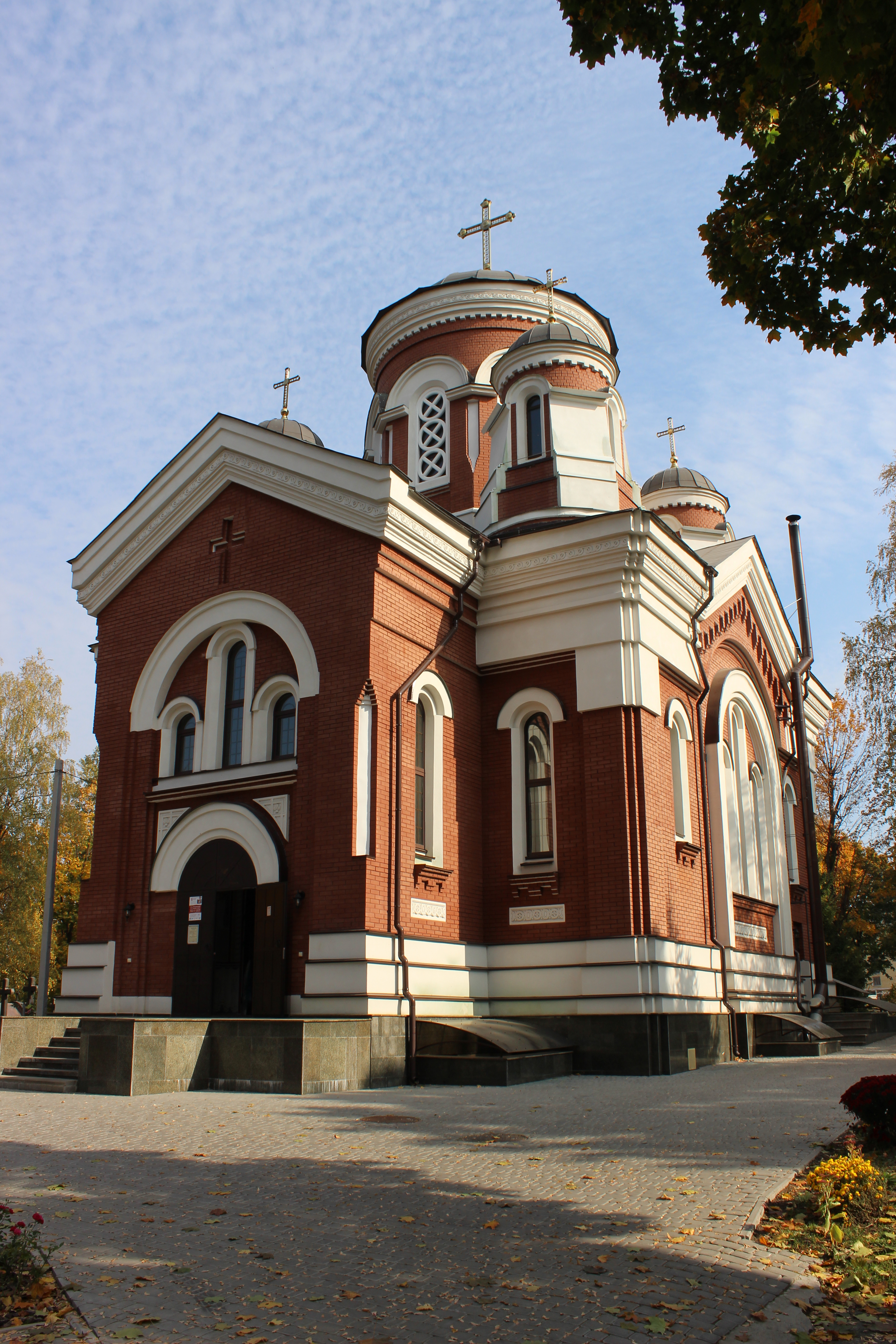 Комплекс пам'яток «Лук'янівське кладовище» (ДІМ «Лук'янівський історико-меморіальний заповідник») Див.: Перелік об'єктів культурної спадщини Лук'янівського кладовища, Київ, Дорогожицька вул., 7